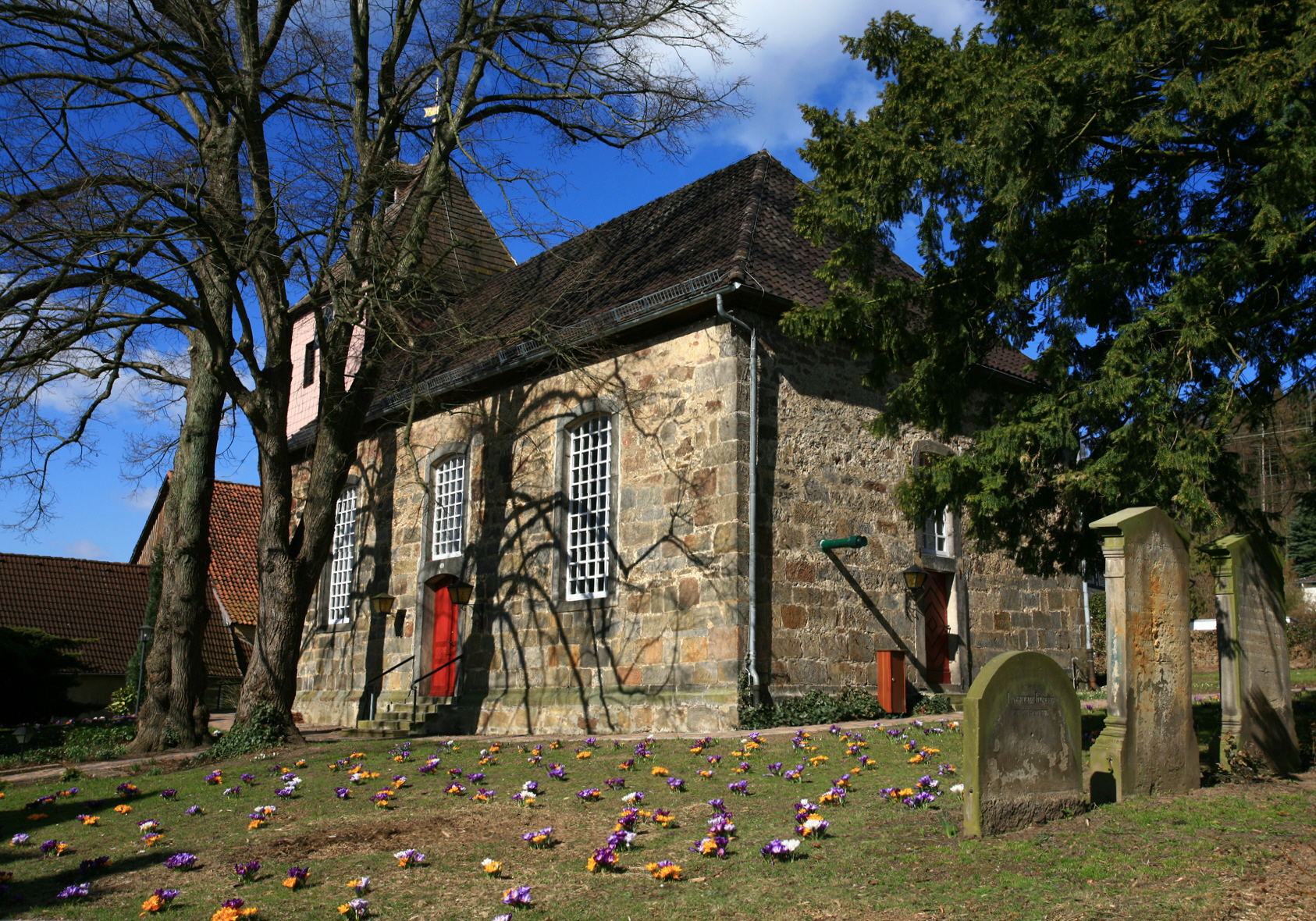 Die St. Georg-Kirche in Afferde (Hameln), links zwei als Naturdenkmal (ND-HM-S 16) geschützte Winterlinden (Tilia cordata)